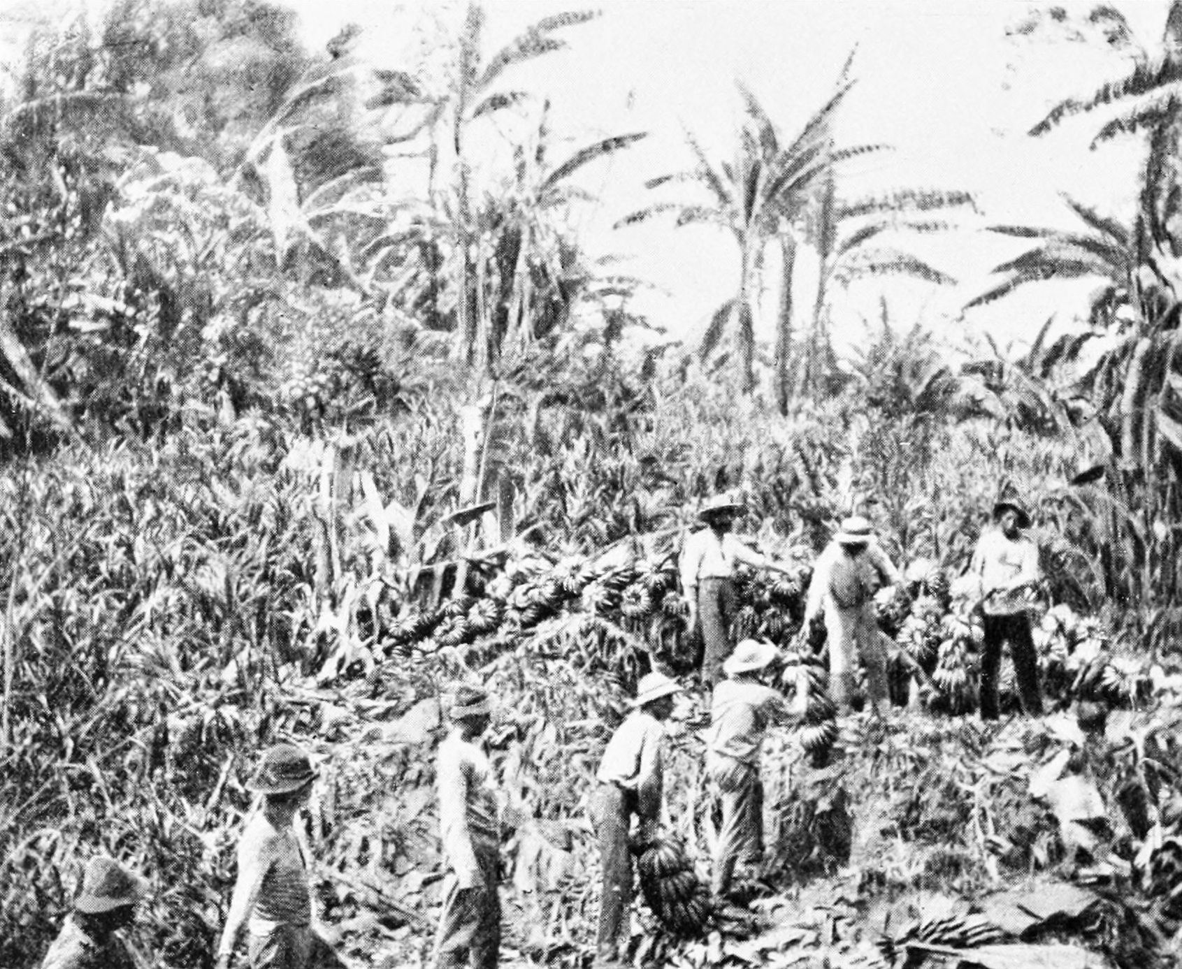 Gathering bananas